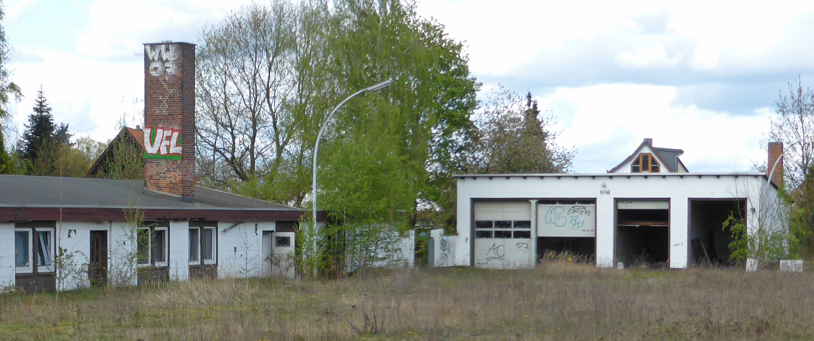 Teilansicht der ehemaligen "Wolfsburger Teigwarenfabrik Driesen & Co" in Reislingen, 2018 abgerissen.